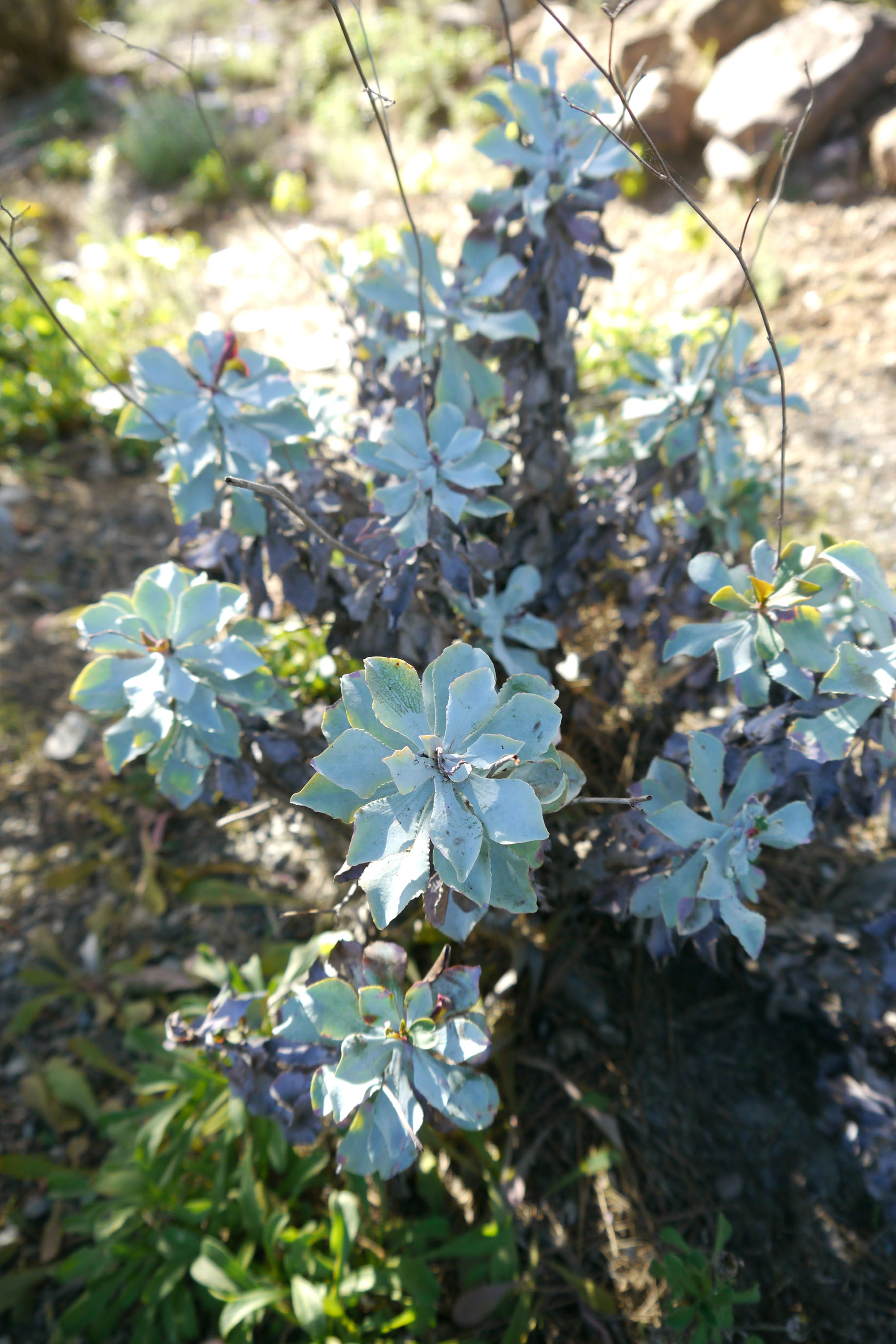 Limonium estevei en el Jardín Botánico del Albardinal, Rodalquilar, Almería (España).